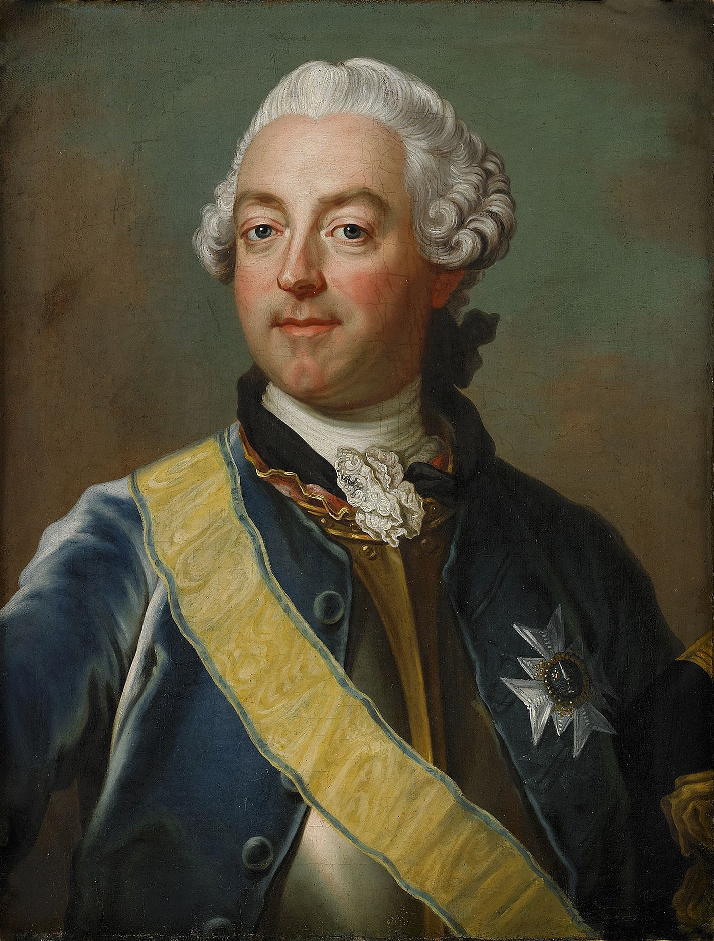 Portrait of Anders Rudolf Du Rietz af Hedensberg (1720-1792)label QS:Lsv,"Porträtt föreställande generallöjtnant friherre Anders Rudolf Du Rietz af Hedensberg (1720-1792)" label QS:Len,"Portrait of Anders Rudolf Du Rietz af Hedensberg (1720-1792)"